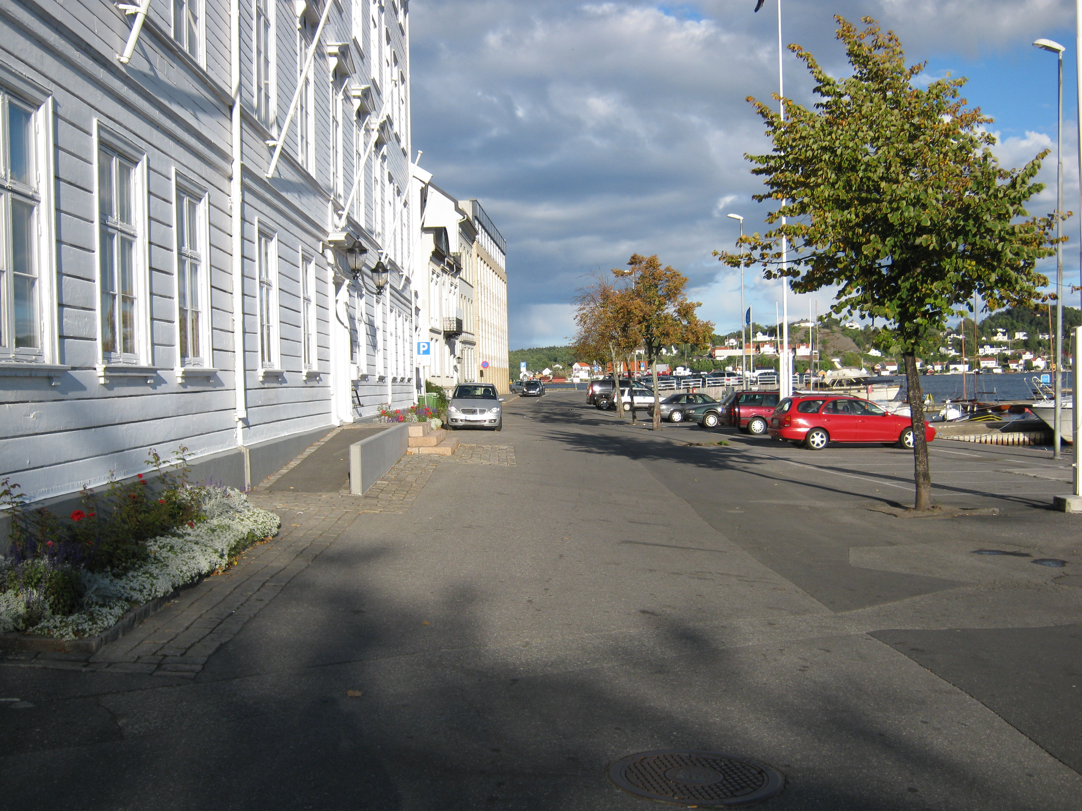 Rådhusgaten i Arendal